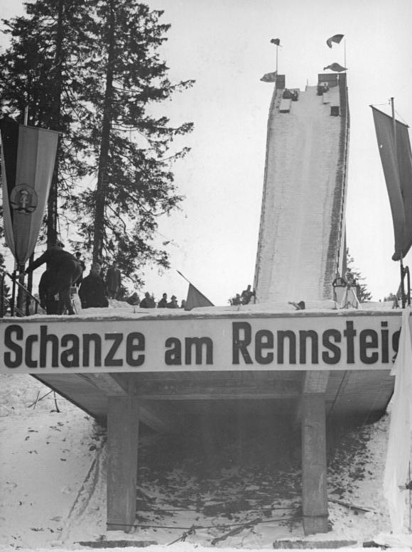 Zentralbild Kohls 23.2.1964 XV. Nordische Skimeisterschaften in Oberhof Vor über 40000 Zuschauern erlebten am 23.2.64 unmittelbar vor dem zweiten Durchgang der Deutschen Meisterschaft die größte Schanze der DDR im Oberhofer Kanzlersgrund ihre feierliche Weihe. DTSB-Präsident Manfred Ewald taufte die neue Großschanze auf den Name "Schanze am Rennsteig".